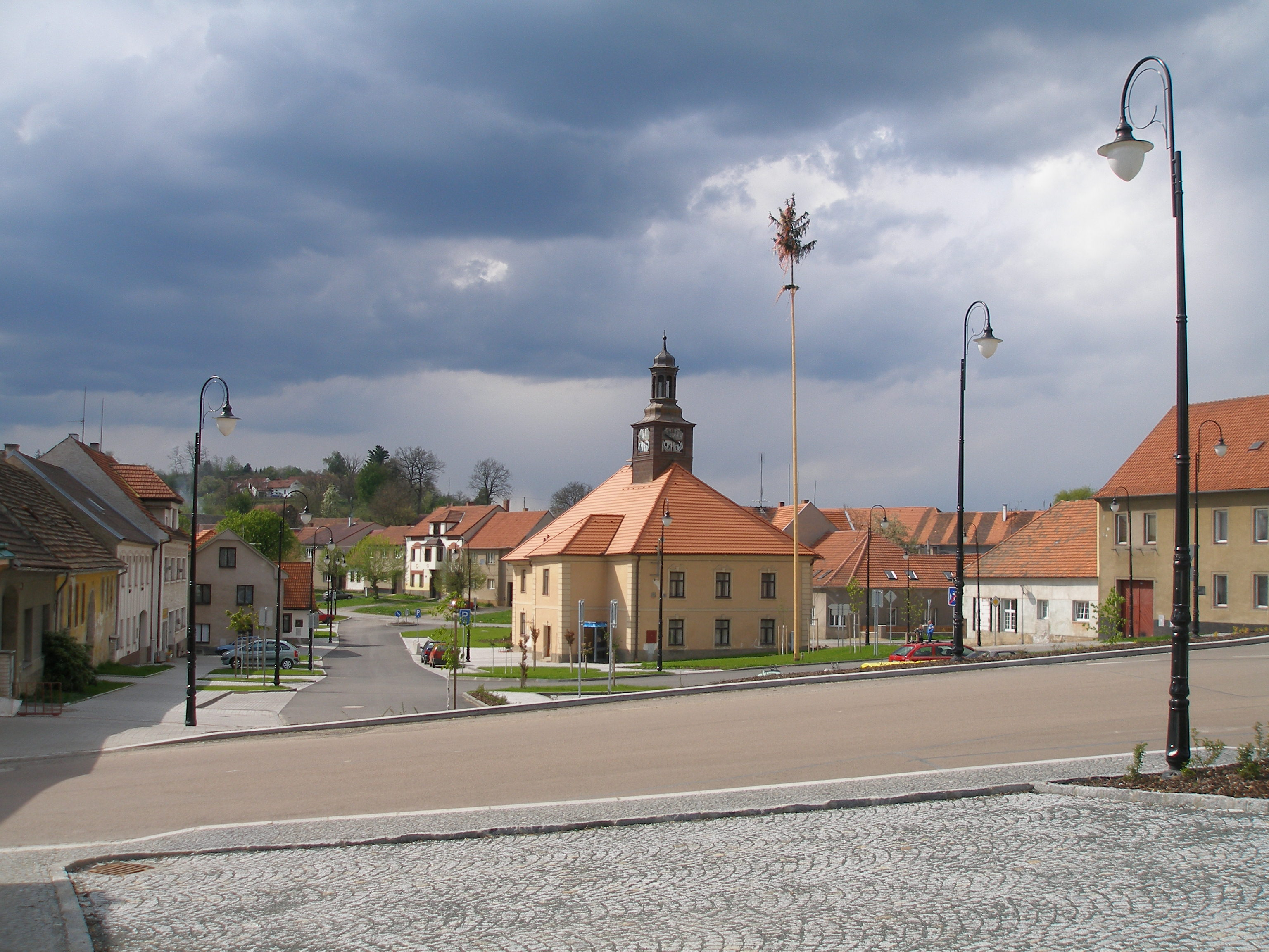 Bělčice - náměstí s radnicí